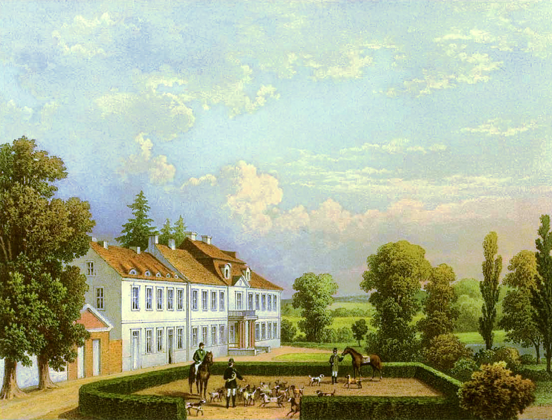 Rittergut Murchin, Kreis Greifswald, Provinz Pommern, Lithografie aus dem 19. Jahrhundert